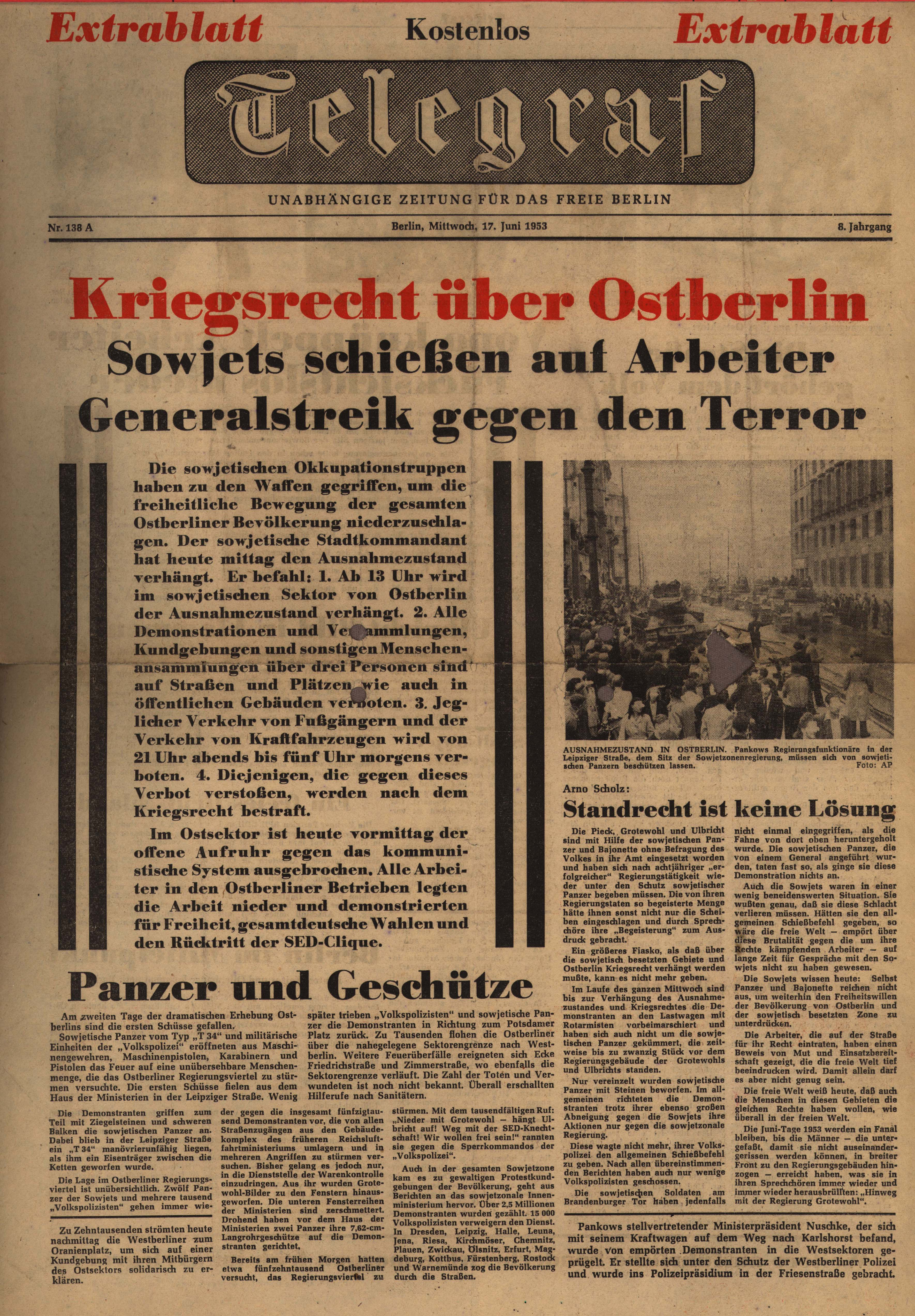 Extrablatt des Berliner Telegraf (Flugblatt)